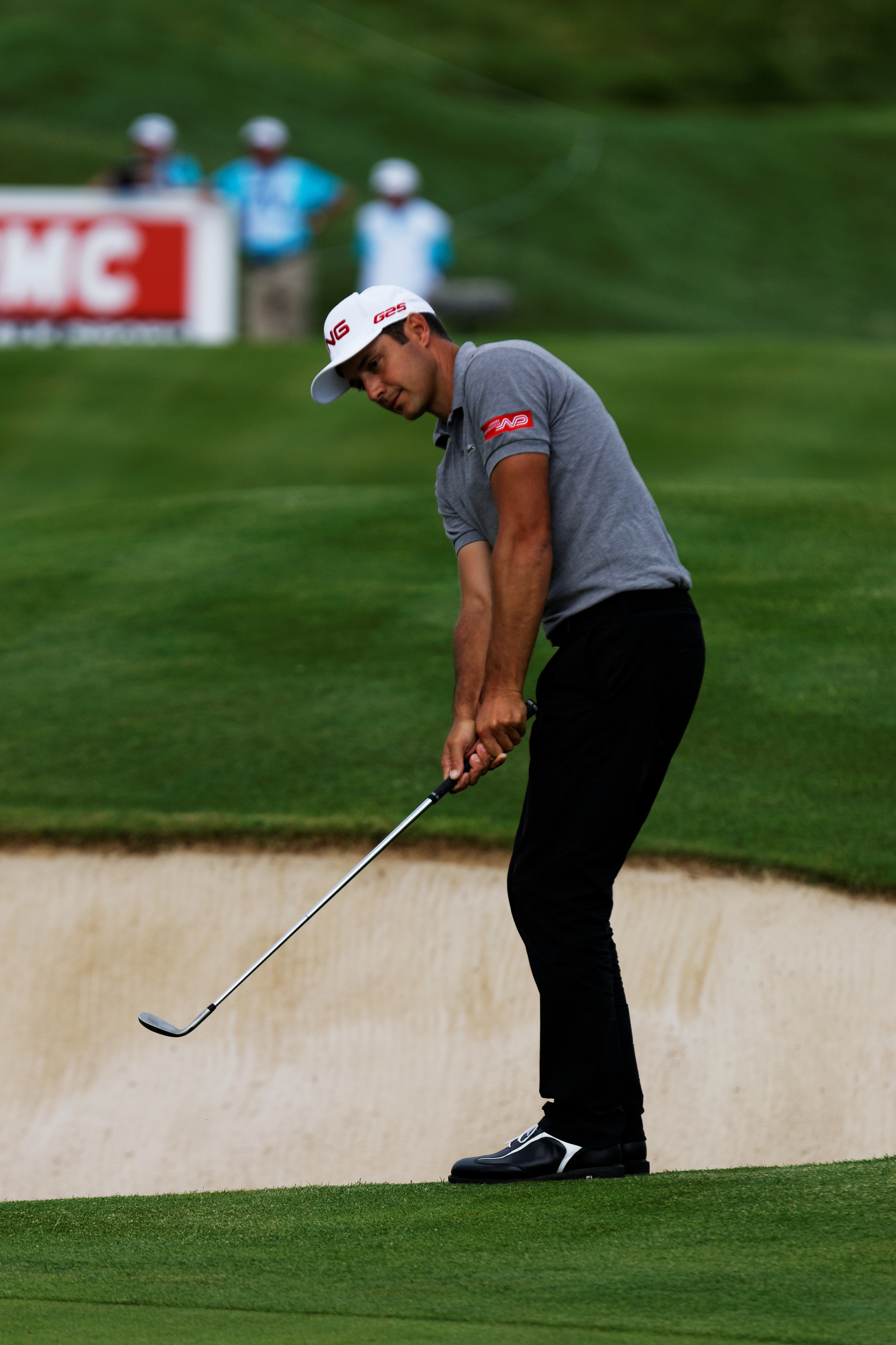 Julien Quesne lors de l'Open de France de golf 2014, sur le green du 18, Golf de St Quentin en Yvelines